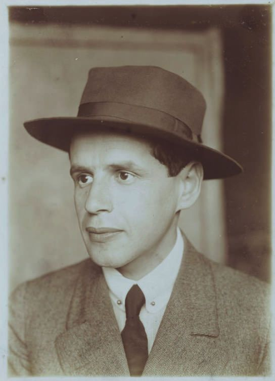 Foto de Lasar Segall durante sua juventude